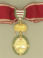 Magyar Koronás Nagy Aranyérem, harmadszori adományozás, 1929